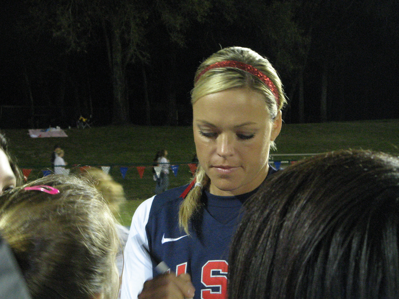 JFinch Altamonte Springs